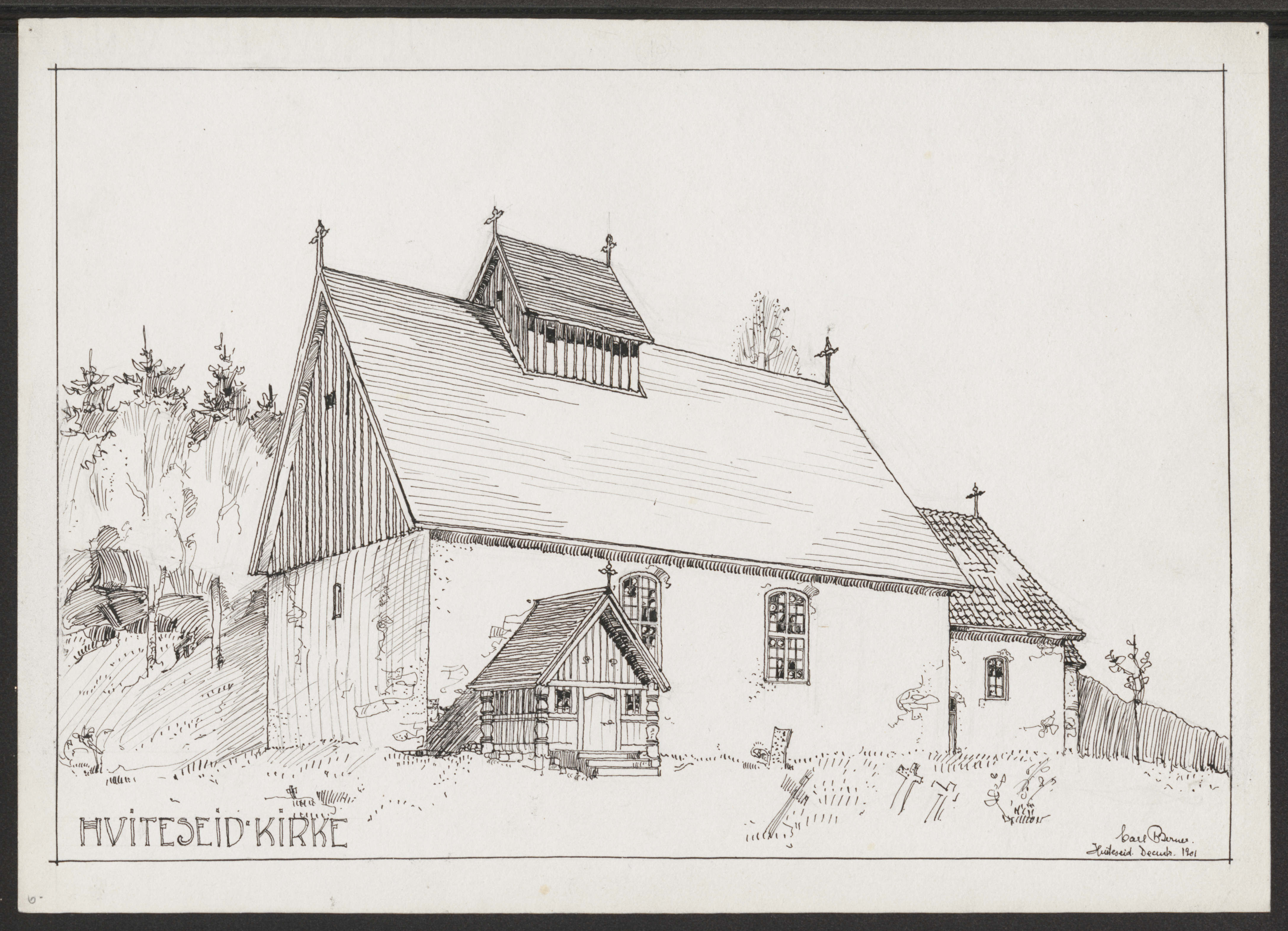 Bildet er hentet fra Riksantikvaren. perspektivskisse sett fra sørøst Eier : Riksantikvaren Sted : Norway, Telemark, Kviteseid Emneord: "MIDDELALDER, STEINKIRKER" Medium : "Tusj;Akvarell"